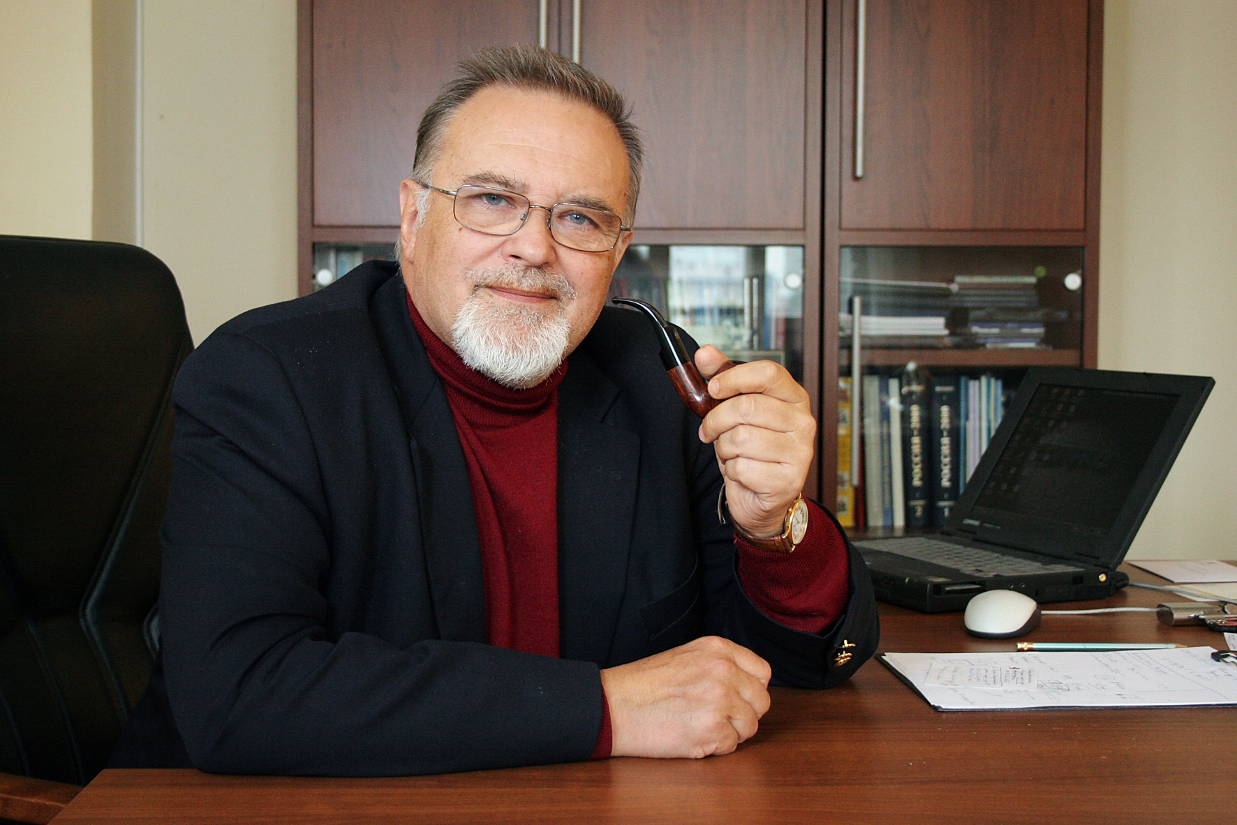 Пономарёв Владимир Николаевич